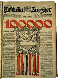 Rostocker Anzeiger titelt mit Überschreitung der 100.000 Einwohner-Grenze